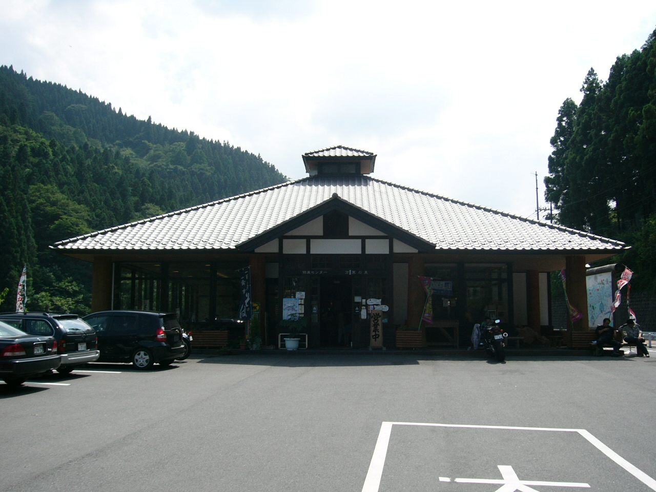 Michinoeki Manba no Sato (Gunma) (道の駅万葉の里)